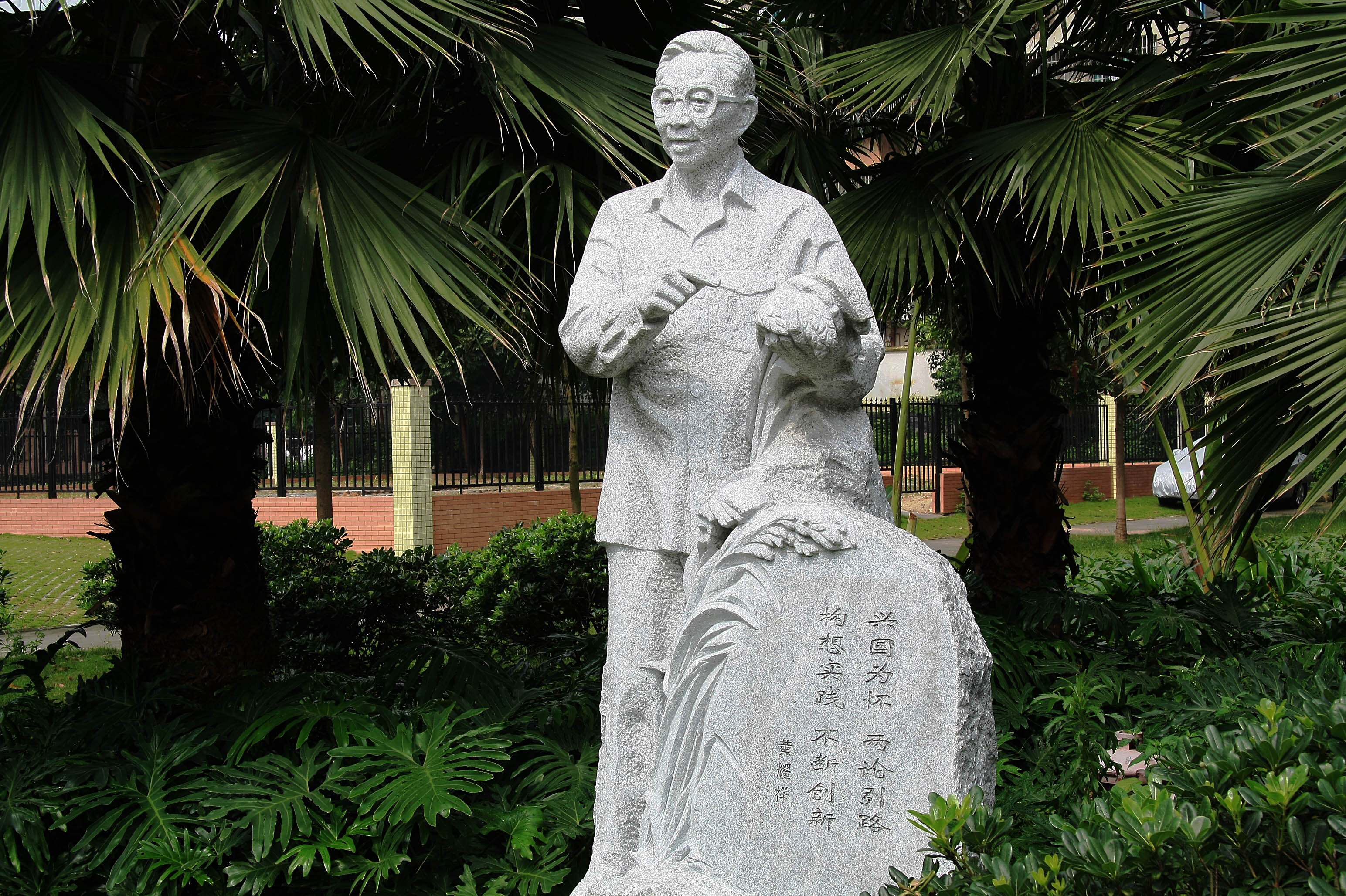 黃耀祥院士石像